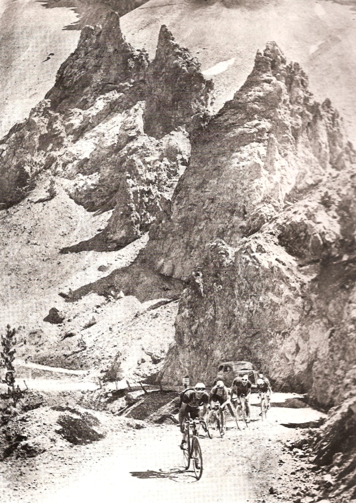 Les échappés pendant la 9e étape du Tour de France 1936